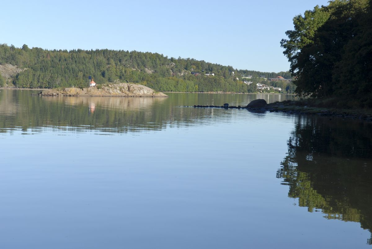 Kausen ligger rett utenfor friområdet ved Ørastranda, og har ilandstigningsforbud i hekketiden.